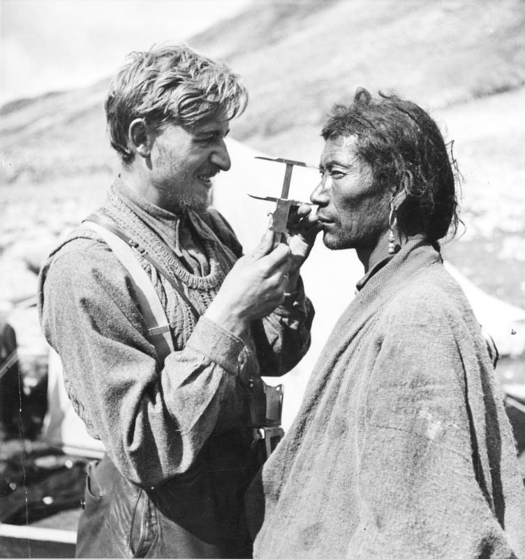 Tibetexpediton, Anthropometrische Untersuchungen Lachen, Beger als Zahnarzt (anthropologische Messung) [Anthropometrie, Kraniometrie] Abgebildete Personen: Beger, Bruno Dr.: SS-Hauptsturmführer, Abteilungsleiter Sven-Hedin-Institut, Deutschland (GND 128720654)